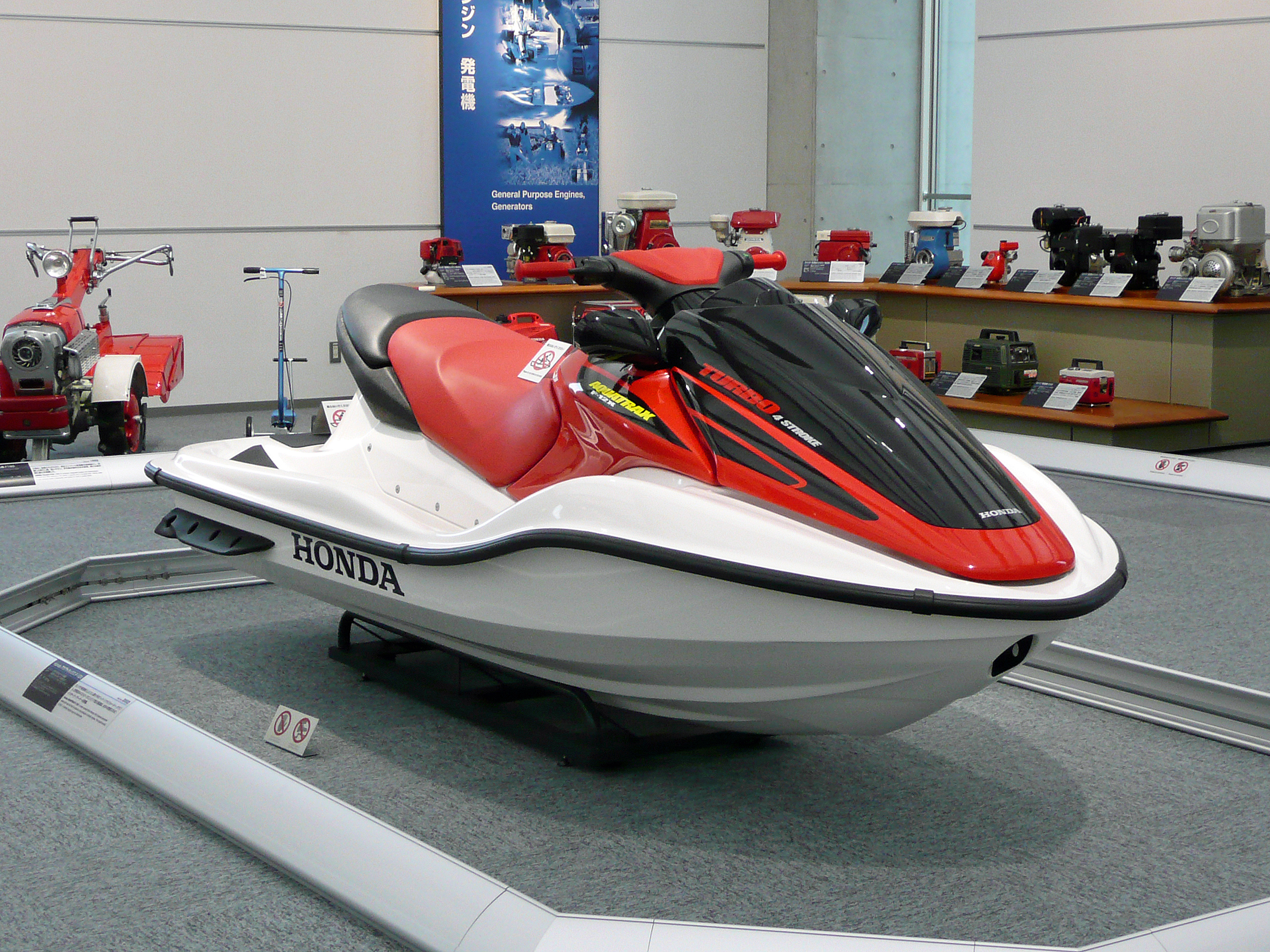 ホンダ Aqua Trax F-12x turbo （水上バイク） ホンれコレクションホールにて撮影